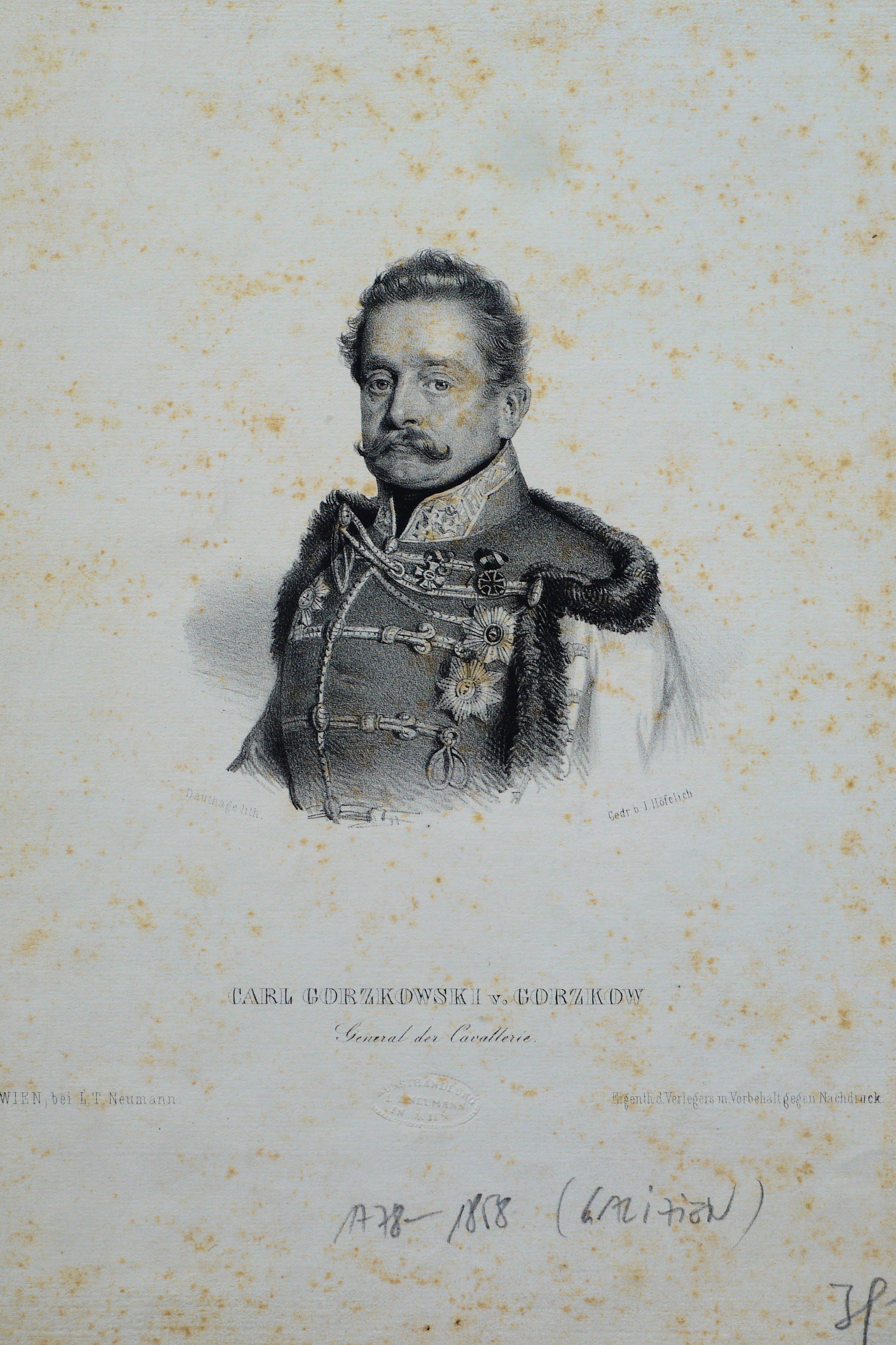 Karl Gorzkowski von Gorzkow (1778-1858), österreichischer General der Kavallerie, Ritter des militäriwchewn Maria-Theresien-Ordens. Lithographie von Adolf Dauthage, ca.1850